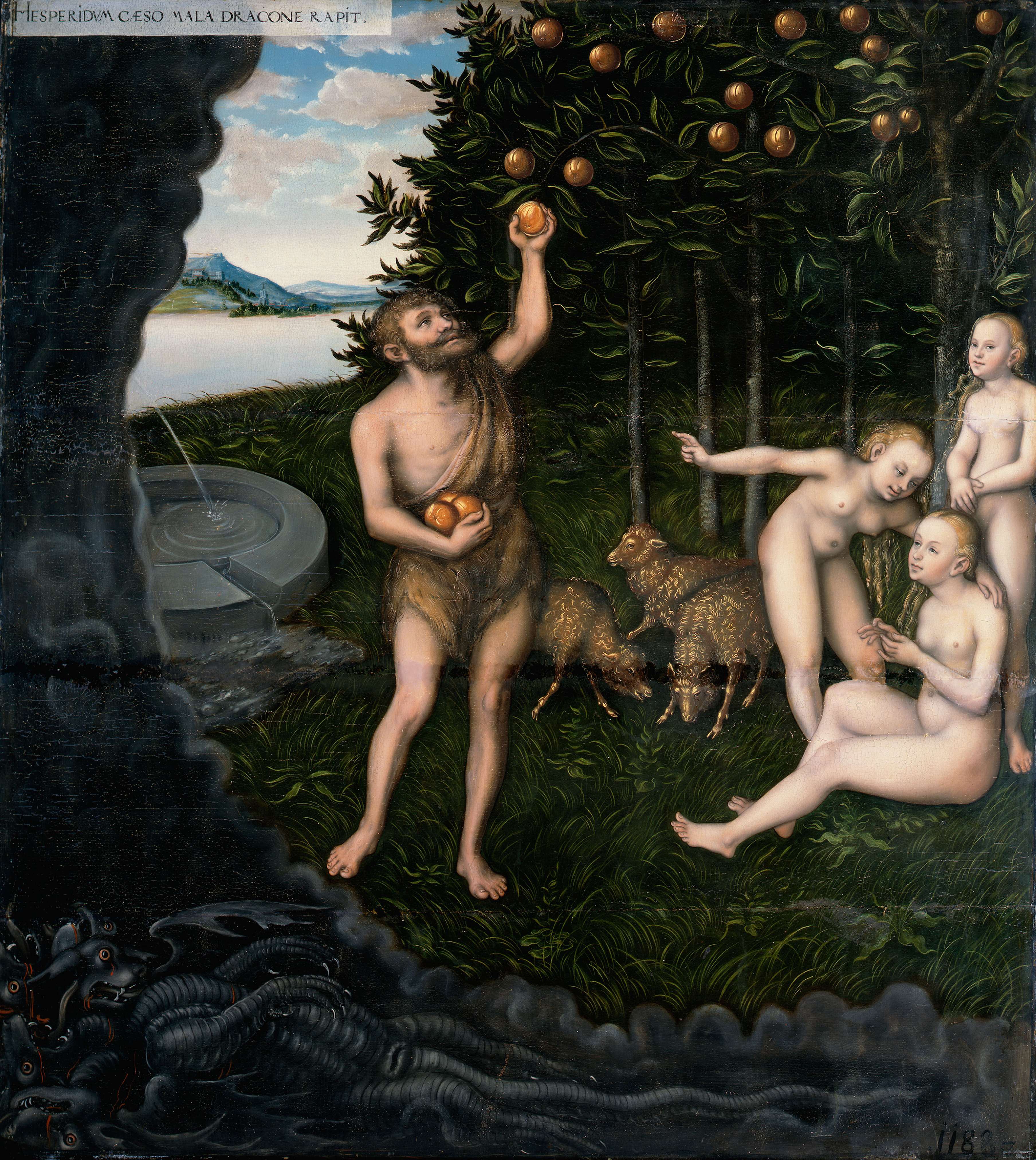 Bildfolge zur Herkules-Legende